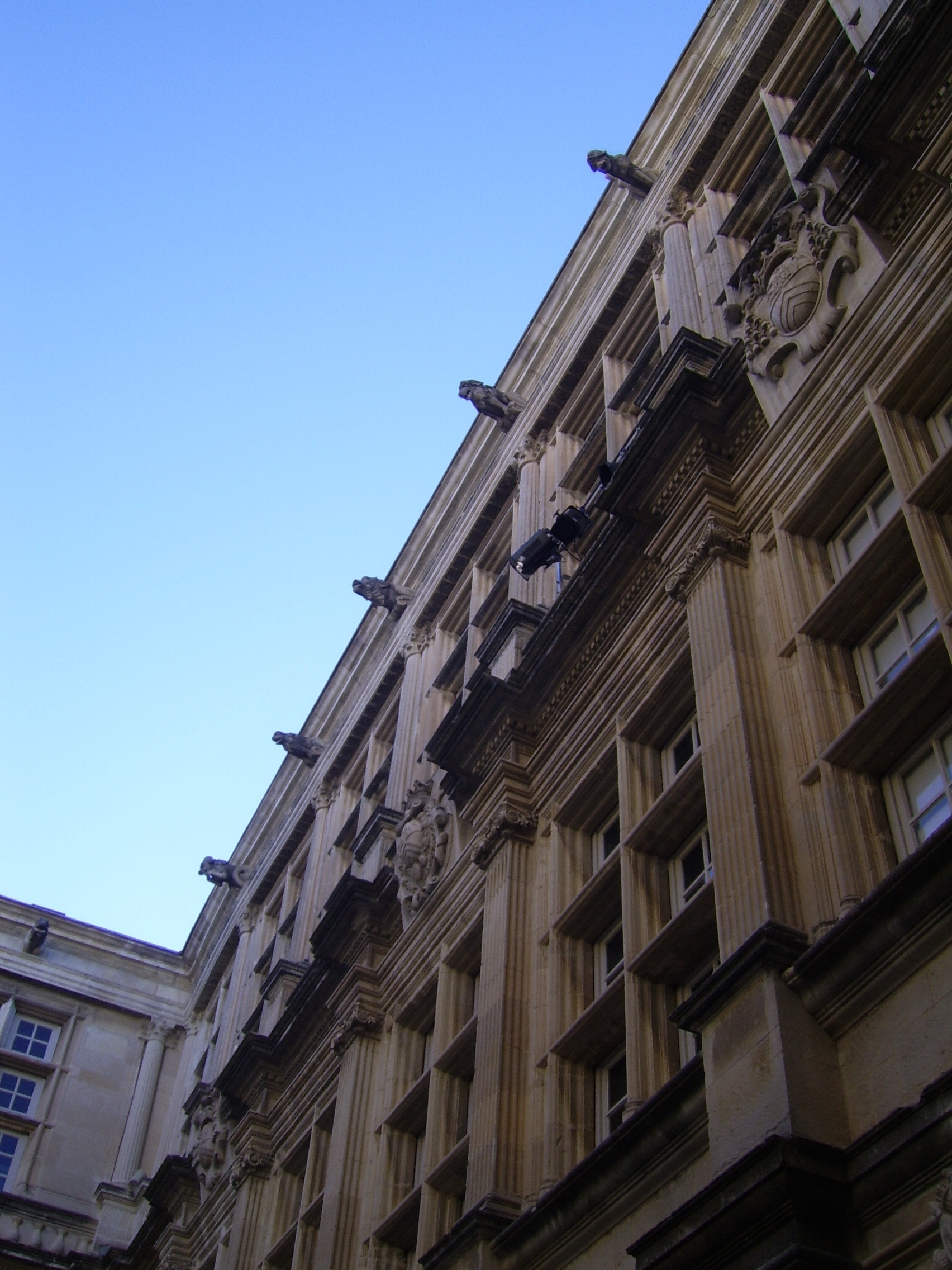 Détail du château de Suze-la-Rousse (cour d'honneur)